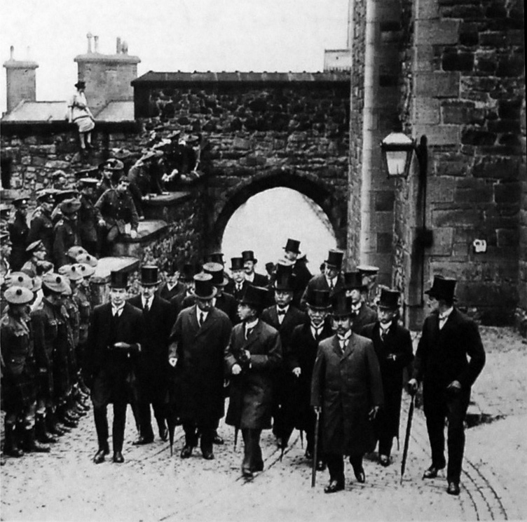 エジンバラに到着した皇太子裕仁親王(Michi-no-miya Hirohito/Emperor Shōwa)。